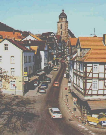 Westheimer Straße in Homburg (Efze), Deutschland